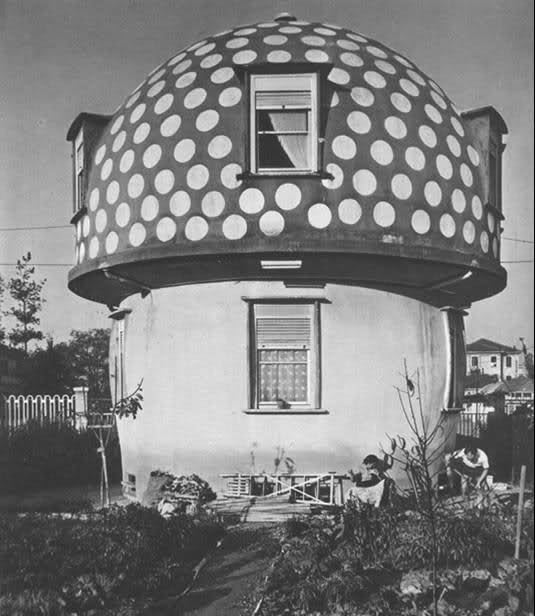 Milano, le demolite case a fungo alla Maggiolina, opera dell'architetto Mario Cavallè